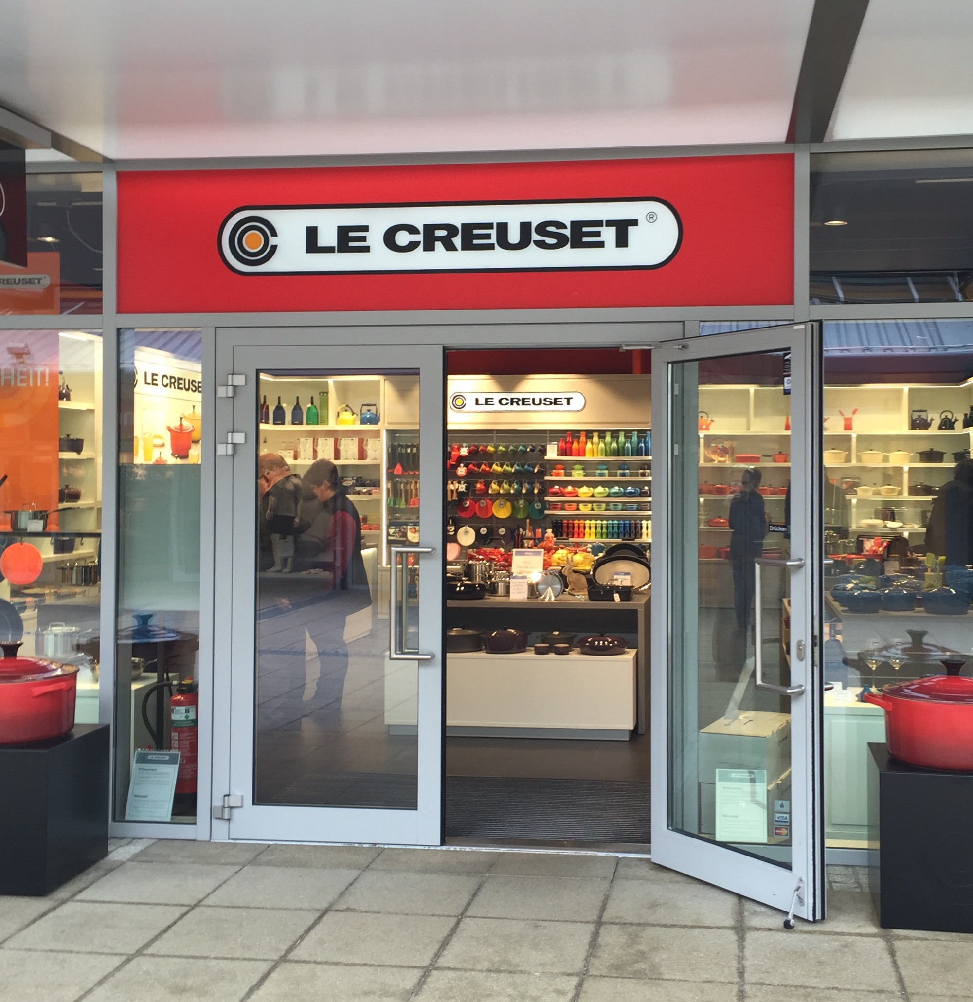 Lke Creuset Store